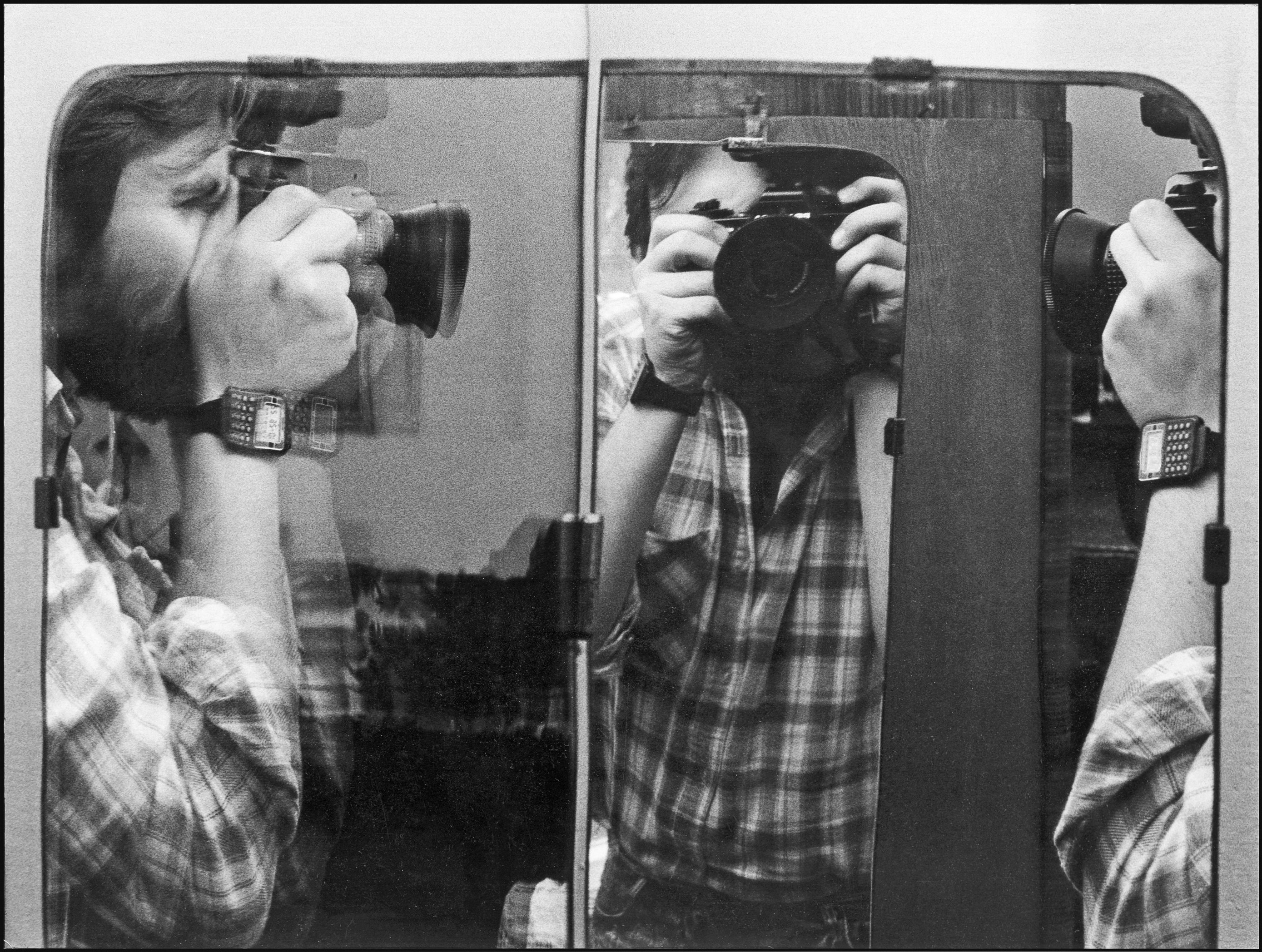 Jacek Halicki, autoportret, rok 1984